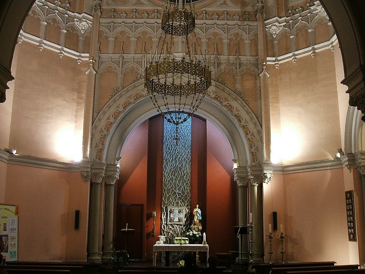 Capilla del Santísimo, iglesia de San Francisco de Asís, Bilbao